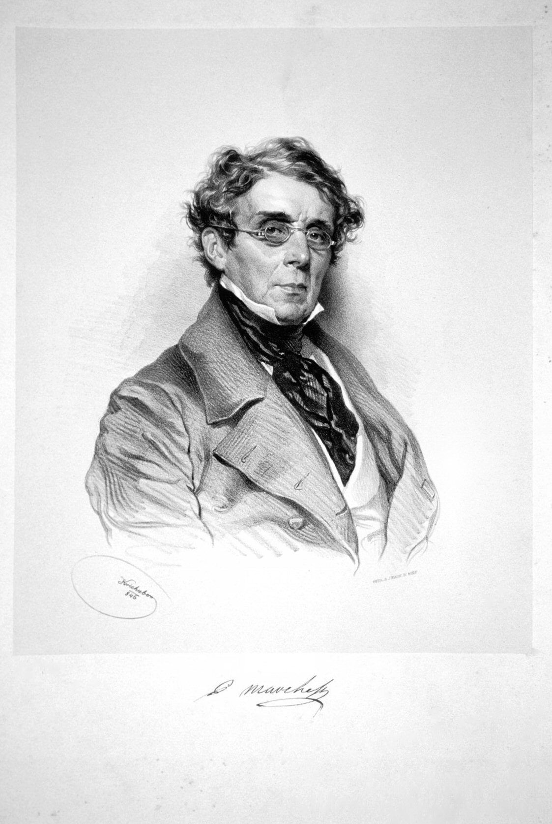 Pompeo Marchesi, Lithographie von Josef Kriehuber, 1846